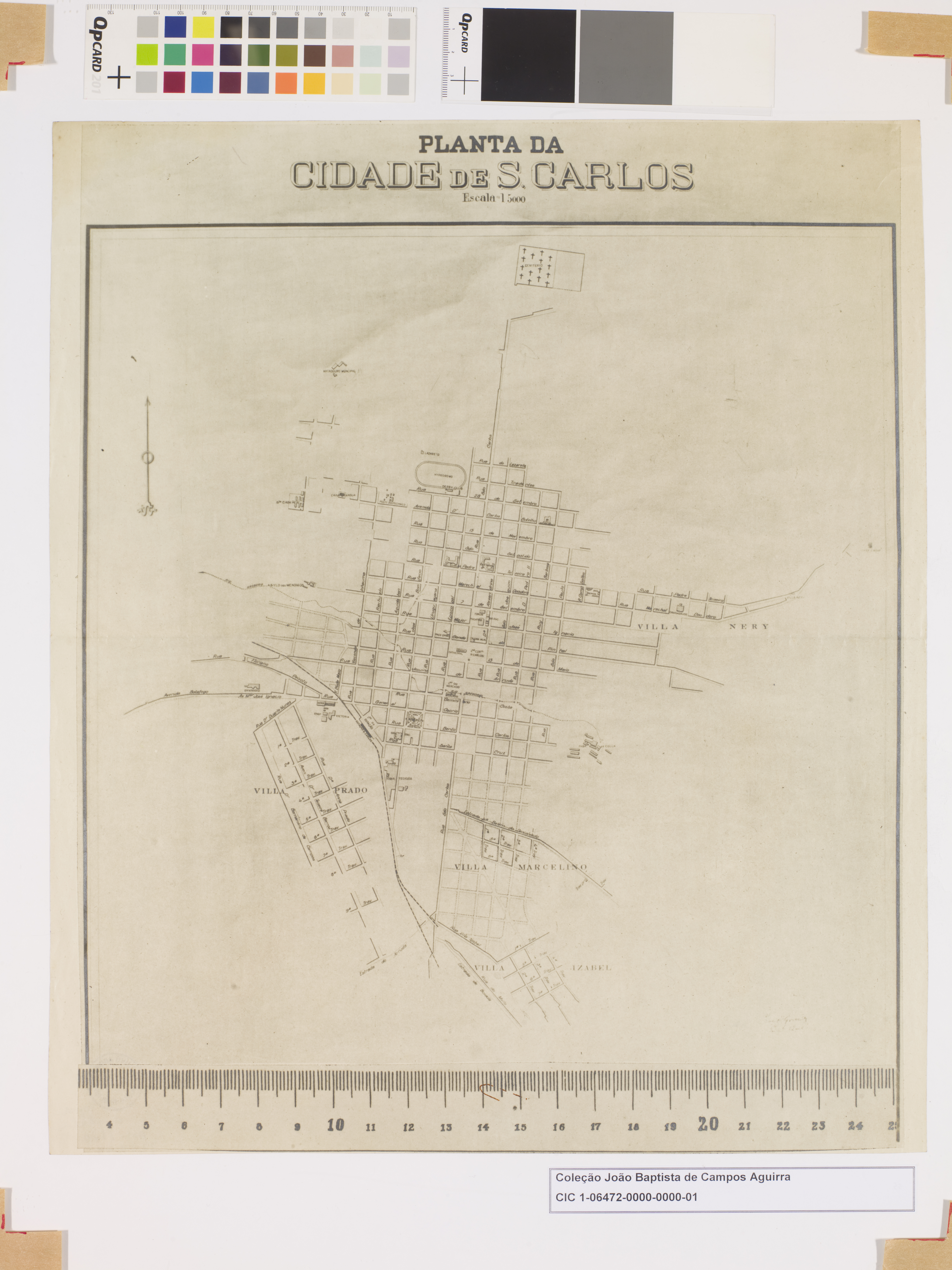 Obra que integra o acervo do Museu Paulista da USP. Coleção João Baptista de Campos Aguirra